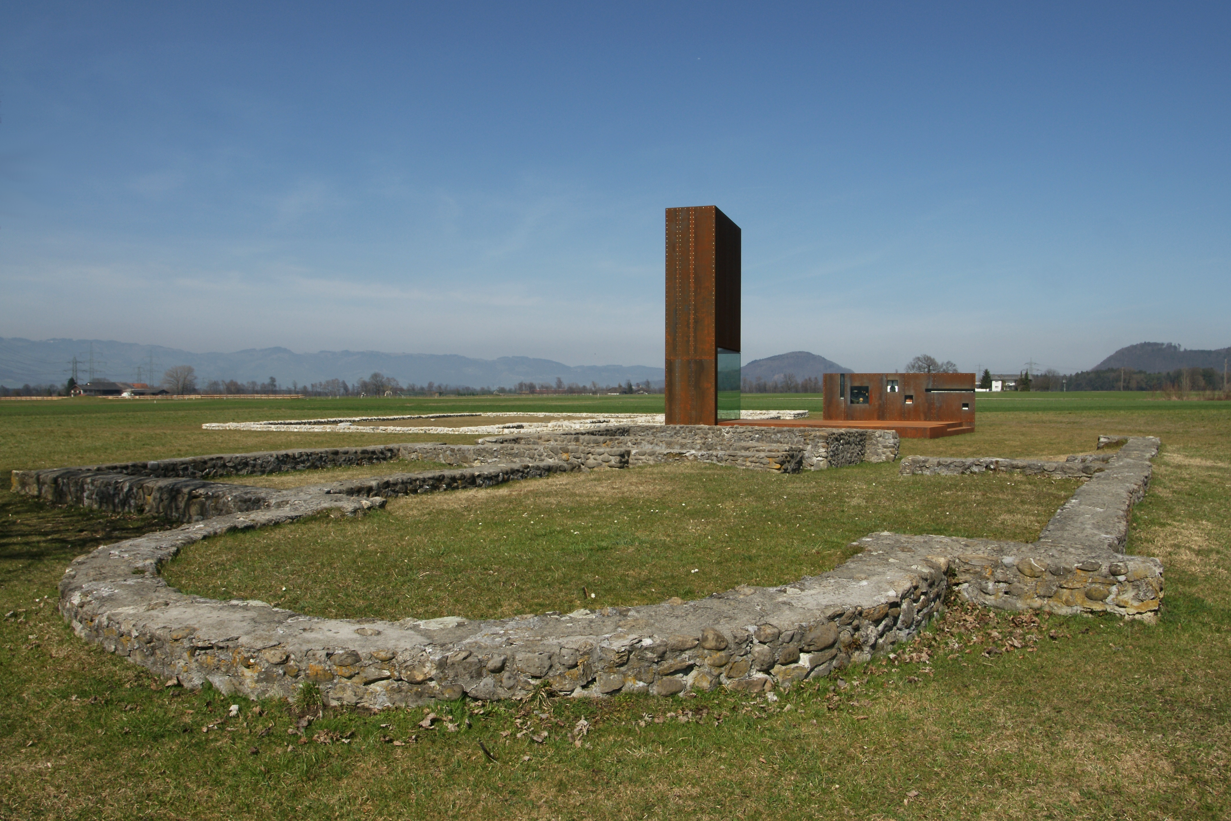 Das Freilichtmuseum "Römervilla" in Rankweil-Brederis. Die implantierte, begehbare Skulptur aus COR-TEN-Stahl stammt von Marte.Marte Architekten ZT Gmbh.